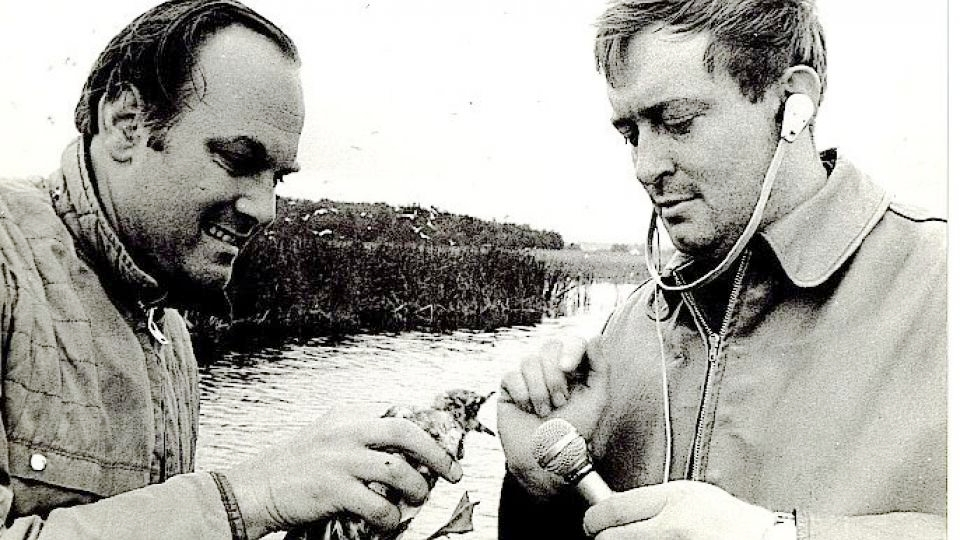 Old. Unger (popiska fotografie): Oldřich Unger (vpravo) a Jefferym Boswallem z BBC v rezervaci Velký a malý Tisý v jižních Čechách s mládětem racka chechtavého (červen 1967). Dokument z největší rozhlasové expedice Meteoru po přírodních rezervacích v Československu. Foto Alexandr Janovský, archiv Oldřicha Ungra.